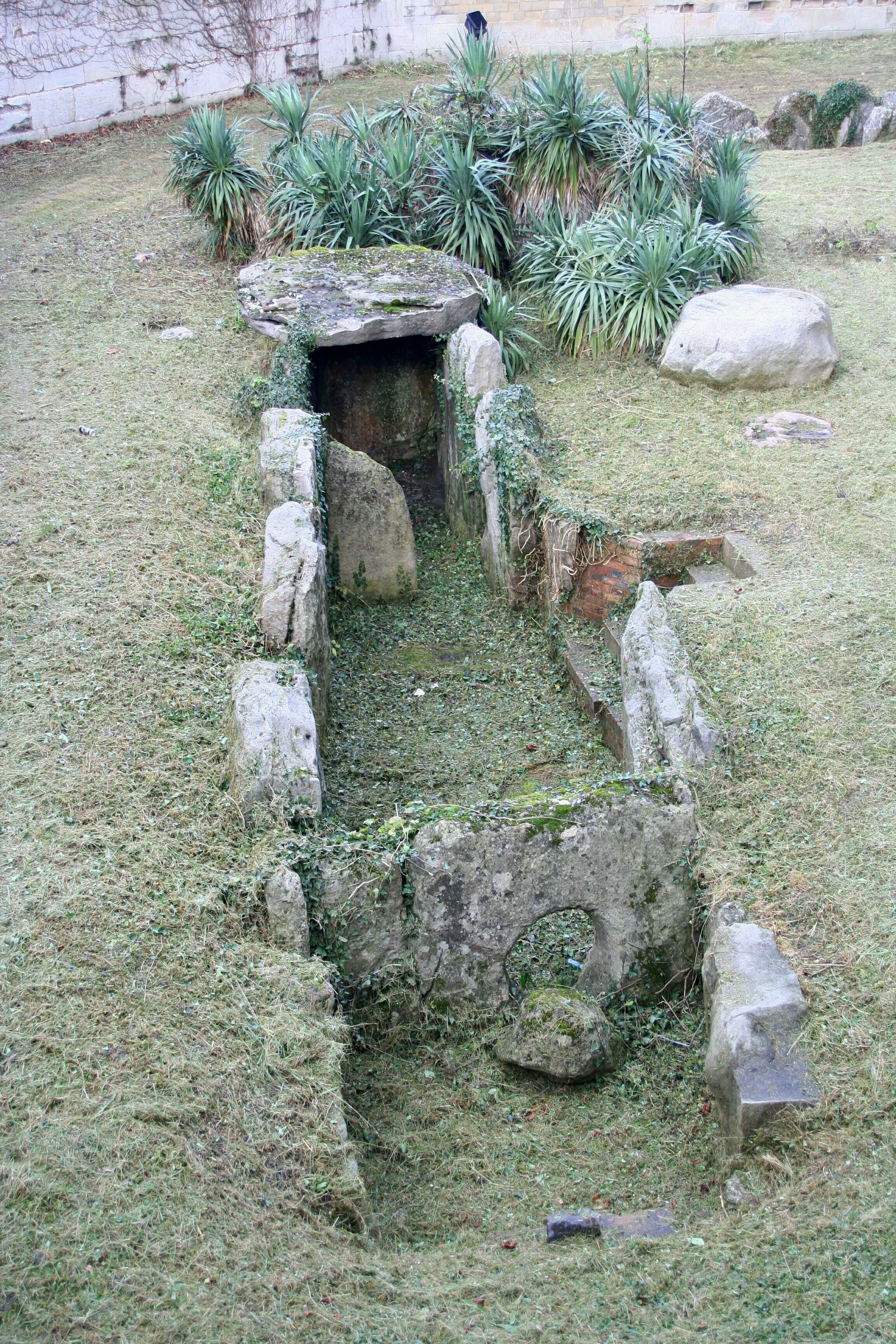 L'allée couverte de Conflans à Saint-Germain-en-Laye - Yvelines (France)Sépulture néolithique découverte à Conflans-Sainte-Honorine et reconstituée dans les fossés du château de Saint-Germain-en-Laye.